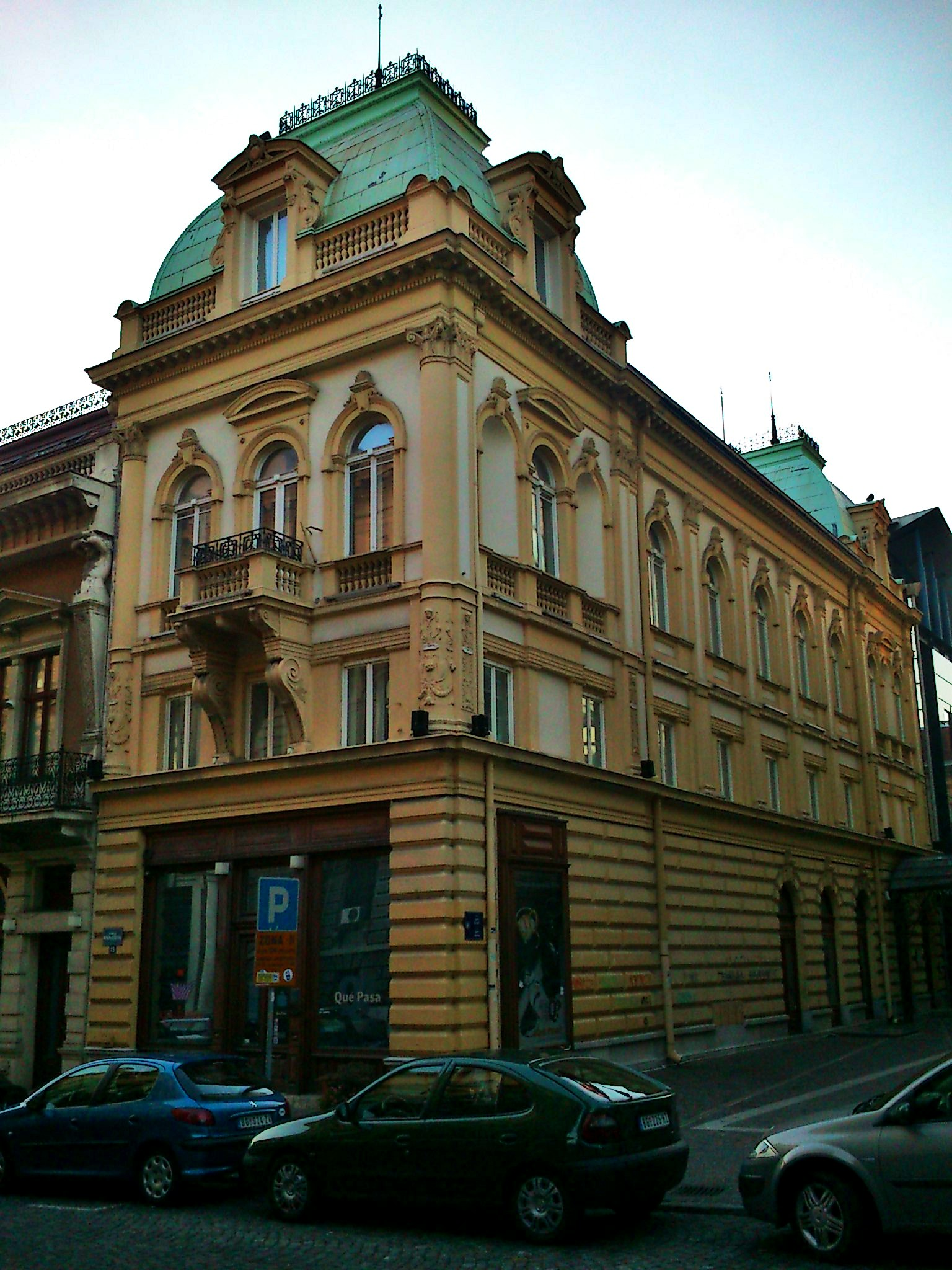 Кућа трговца Црвенчанина